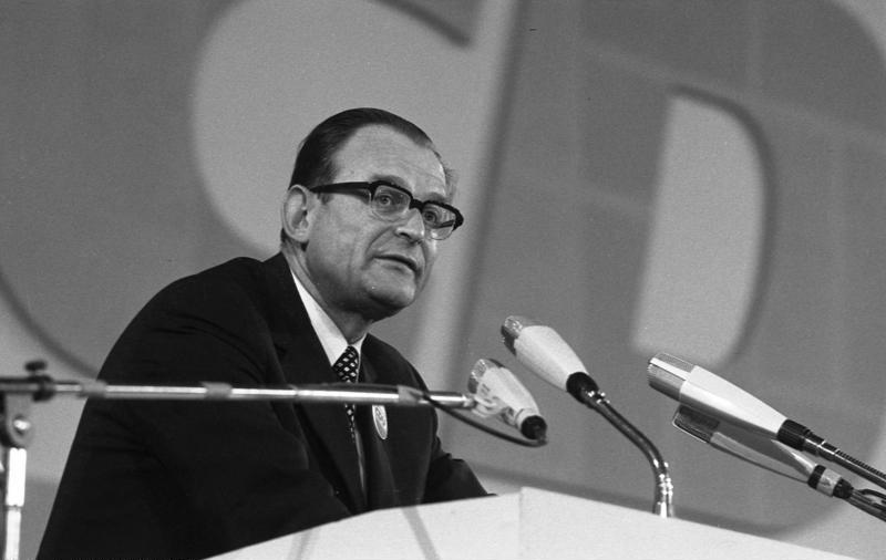 CDU-Parteitag 1972 in der Wiesbadener Rhein-Main-Halle. (Dr. Konrad Kraske) 9.-11.10.1972